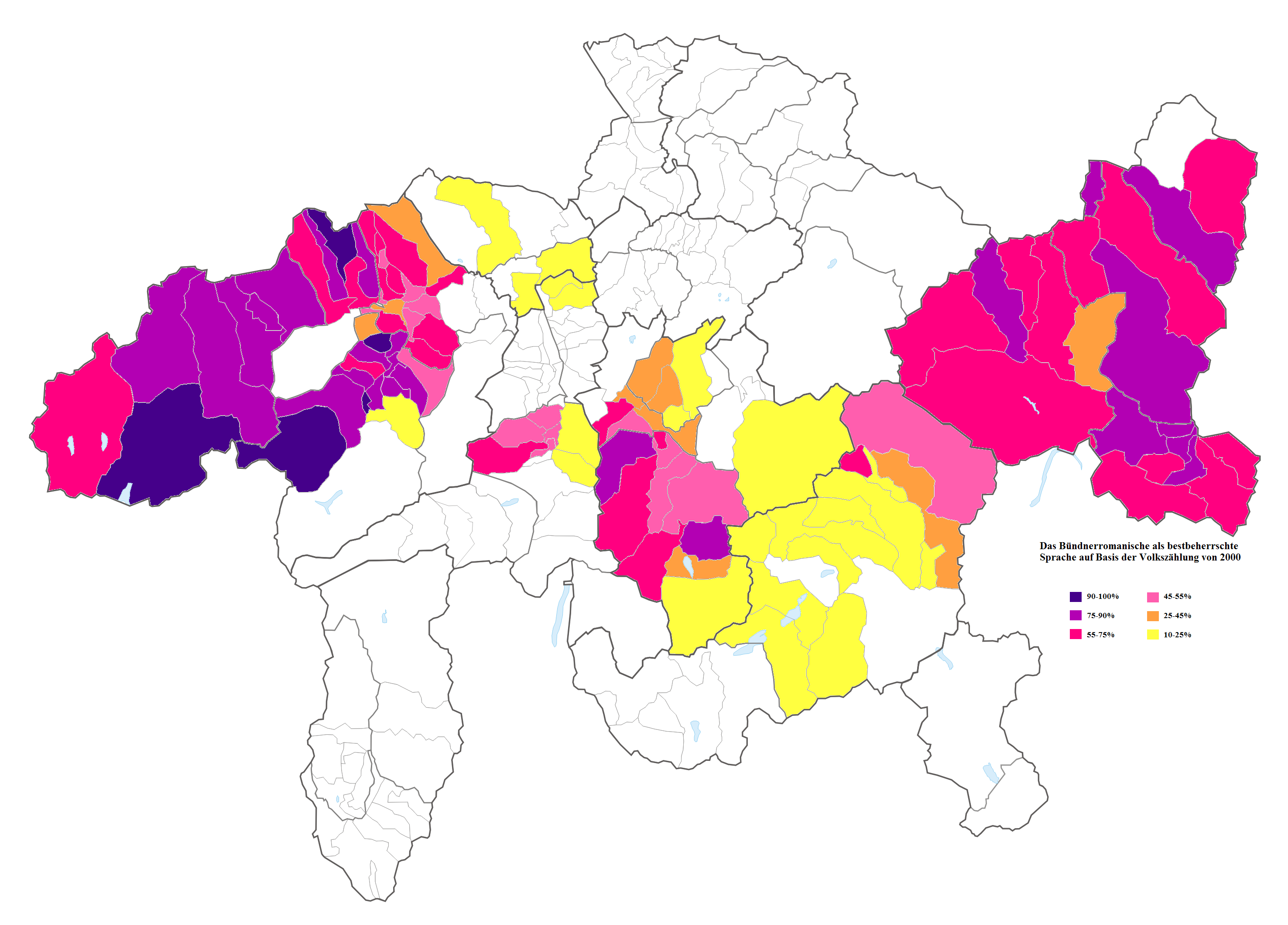 Das Romanische als bestbeherrschte Sprache auf Basis der Volkszählung von 2000.